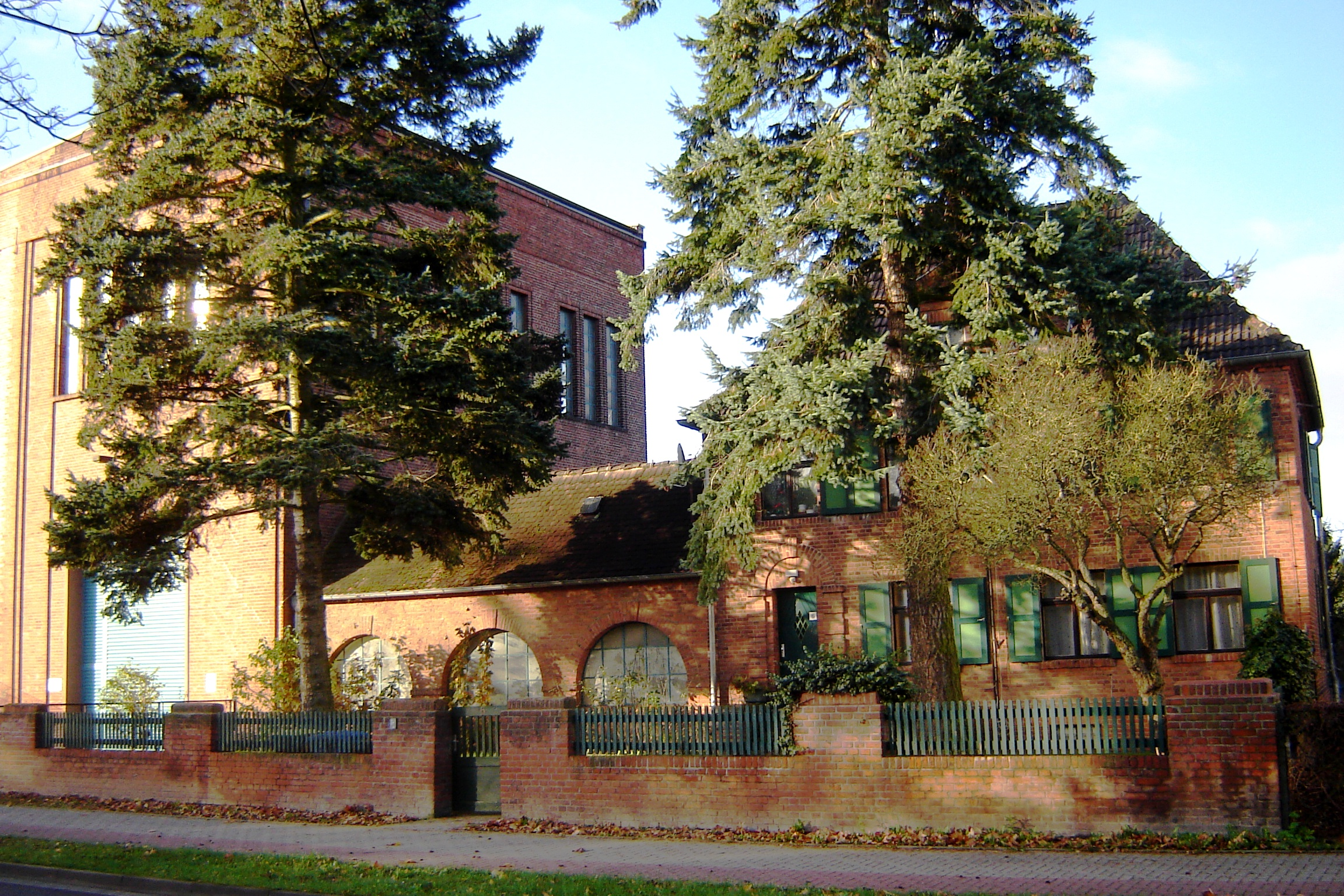 Magdeburg-Diesdorf, Trafostation (Kulturdenkmal)